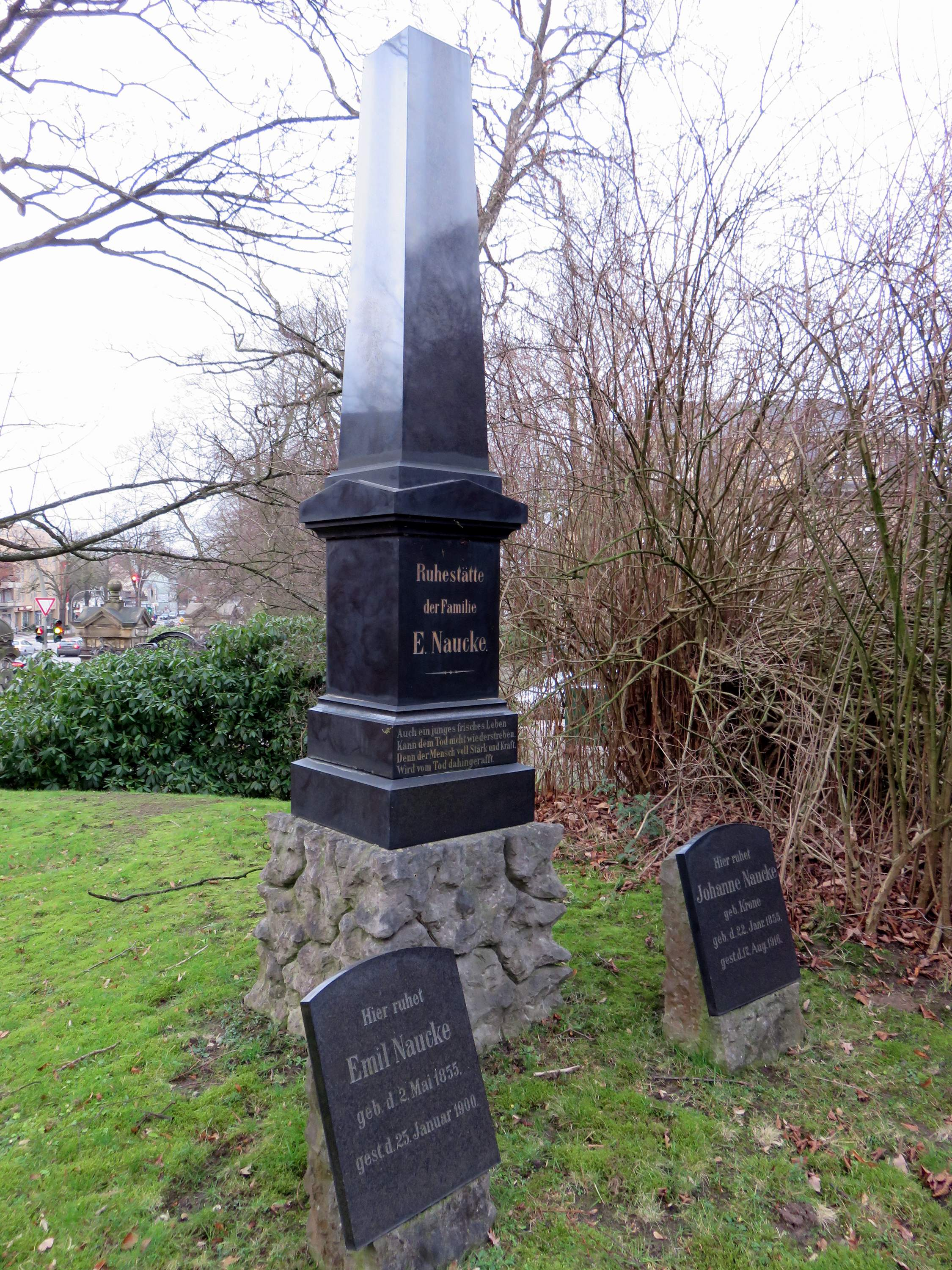 Grabmal für den deutschen Berufsartisten Emil Naucke (1855 – 1900) am Museum auf dem Hamburger Friedhof Ohlsdorf, Inschrift bei .